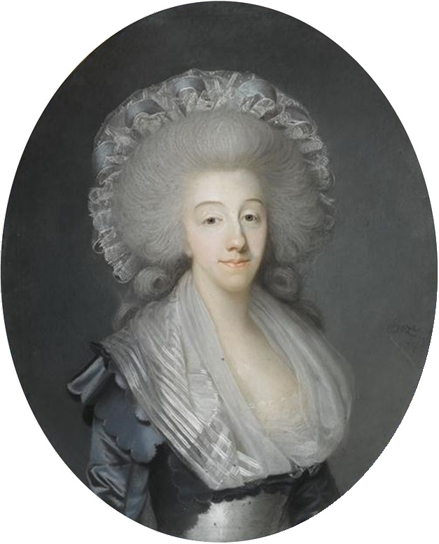 Marie-Thérèse de Savoie, comtesse d’Artois (1756-1805)